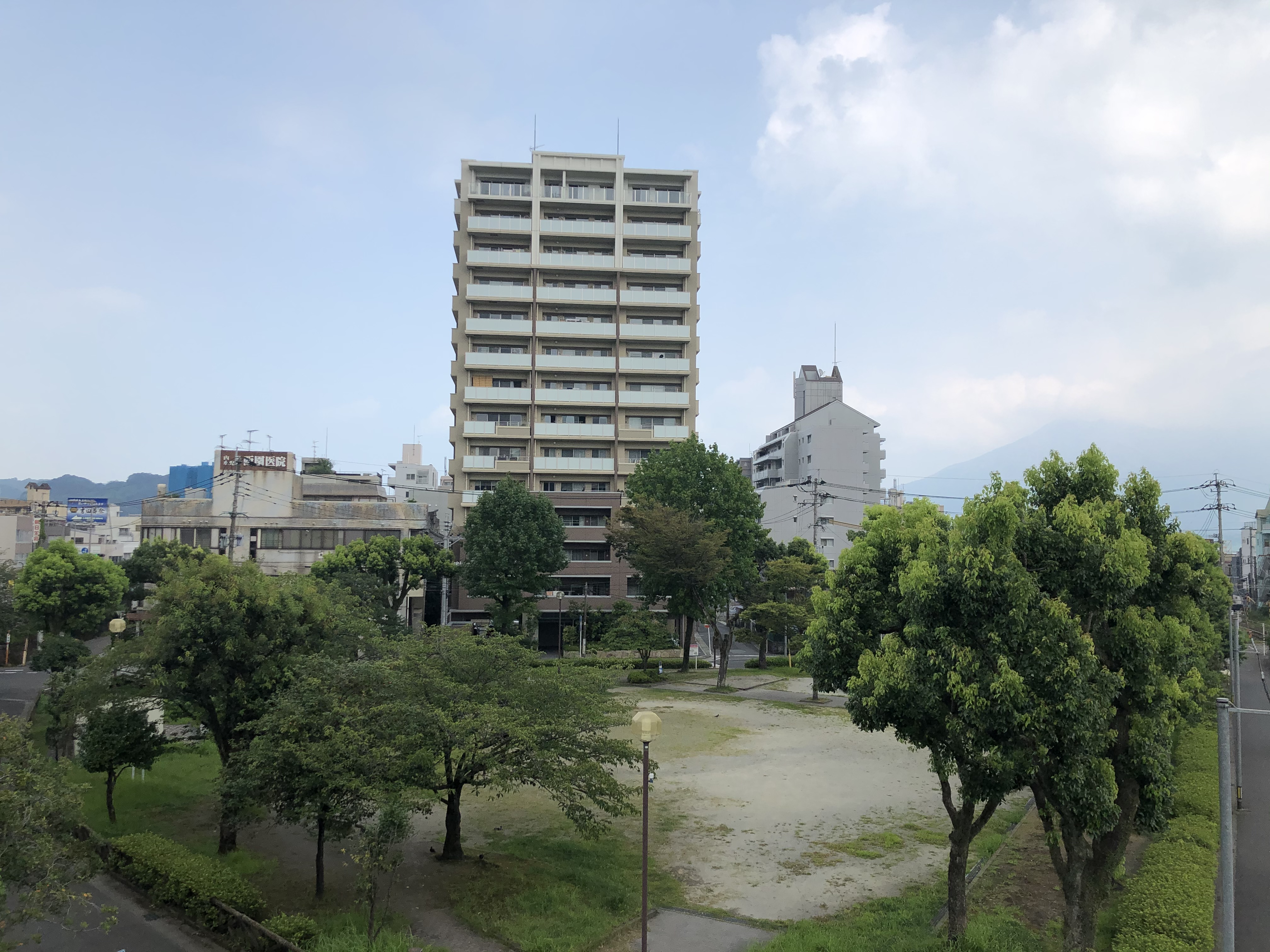 鹿児島市上本町を国道10号長田陸橋から望む。画像手前に見えるのは上本町公園。